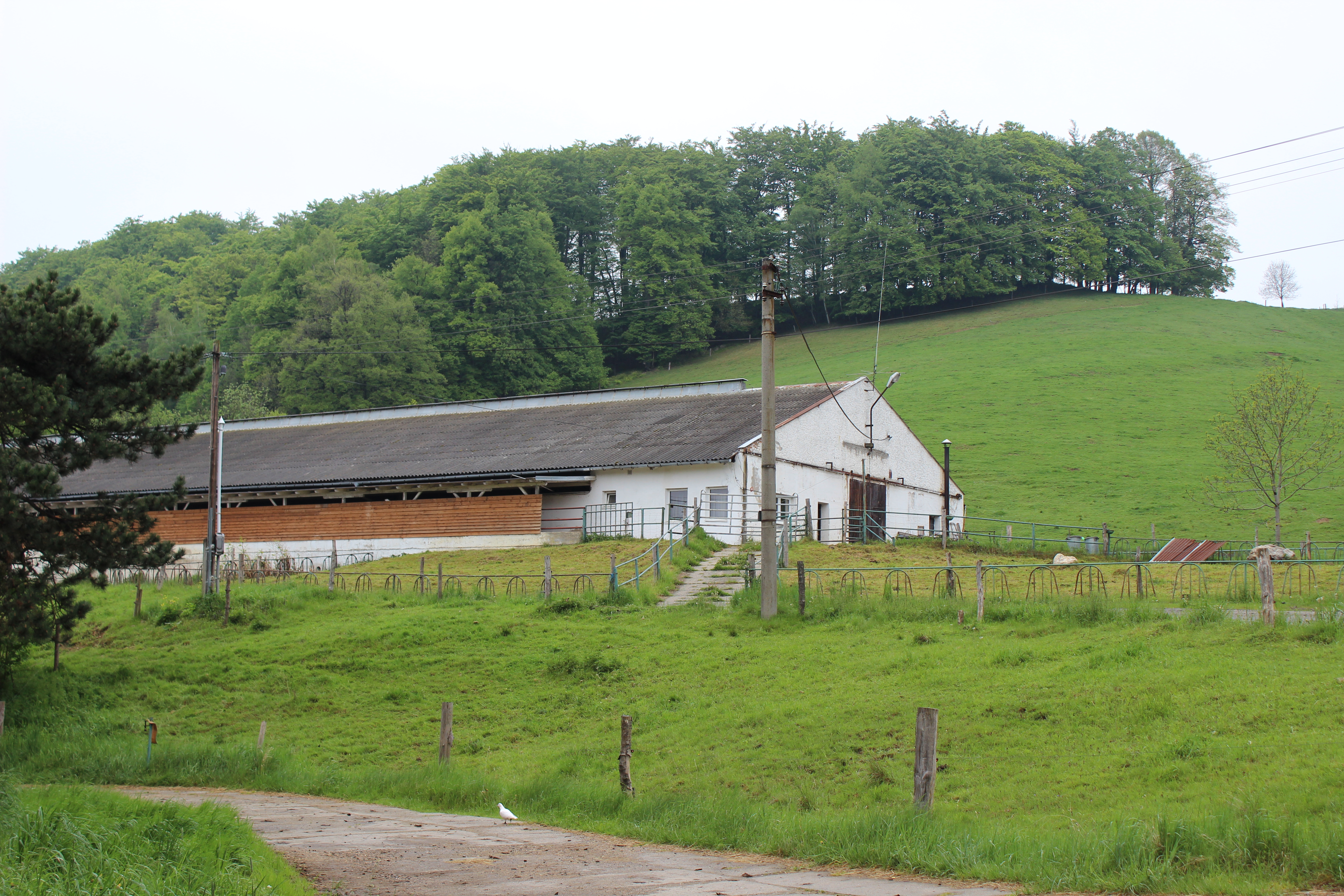 Teletník v Pekle, části Raspenavy (dům číslo popisné 10).